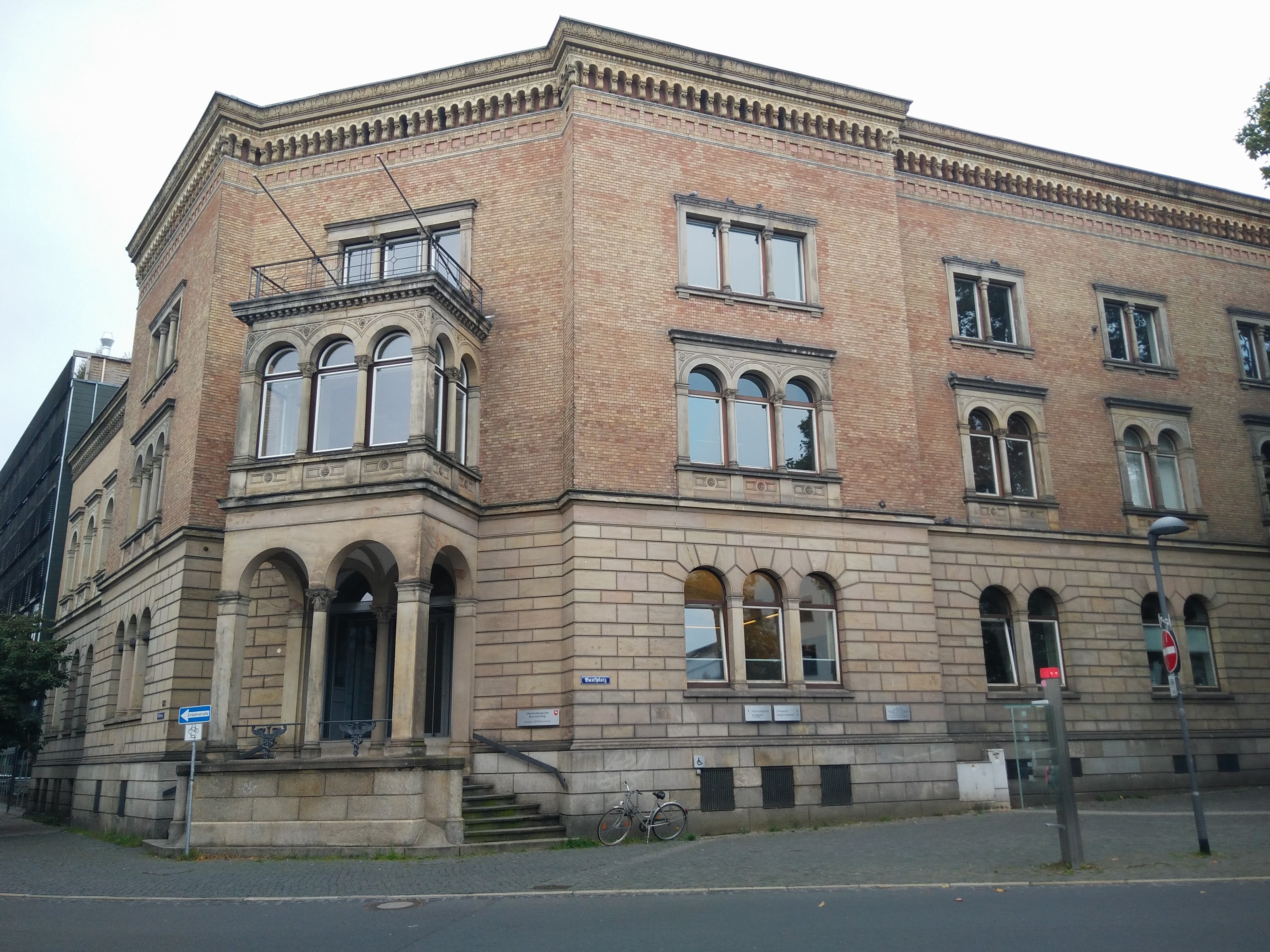 Gebäude Oberlandesgericht Braunschweig am Bankplatz, ehemals Gebäude der Braunschweigischen Bank